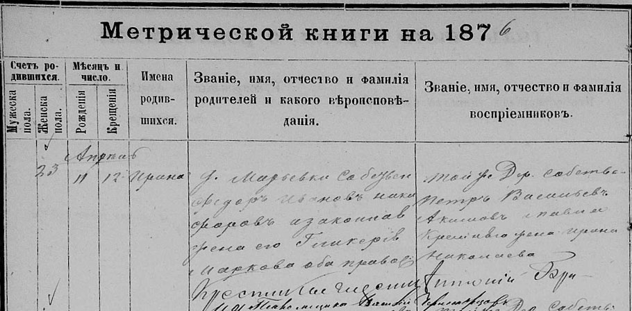 Запис в метричній книзі